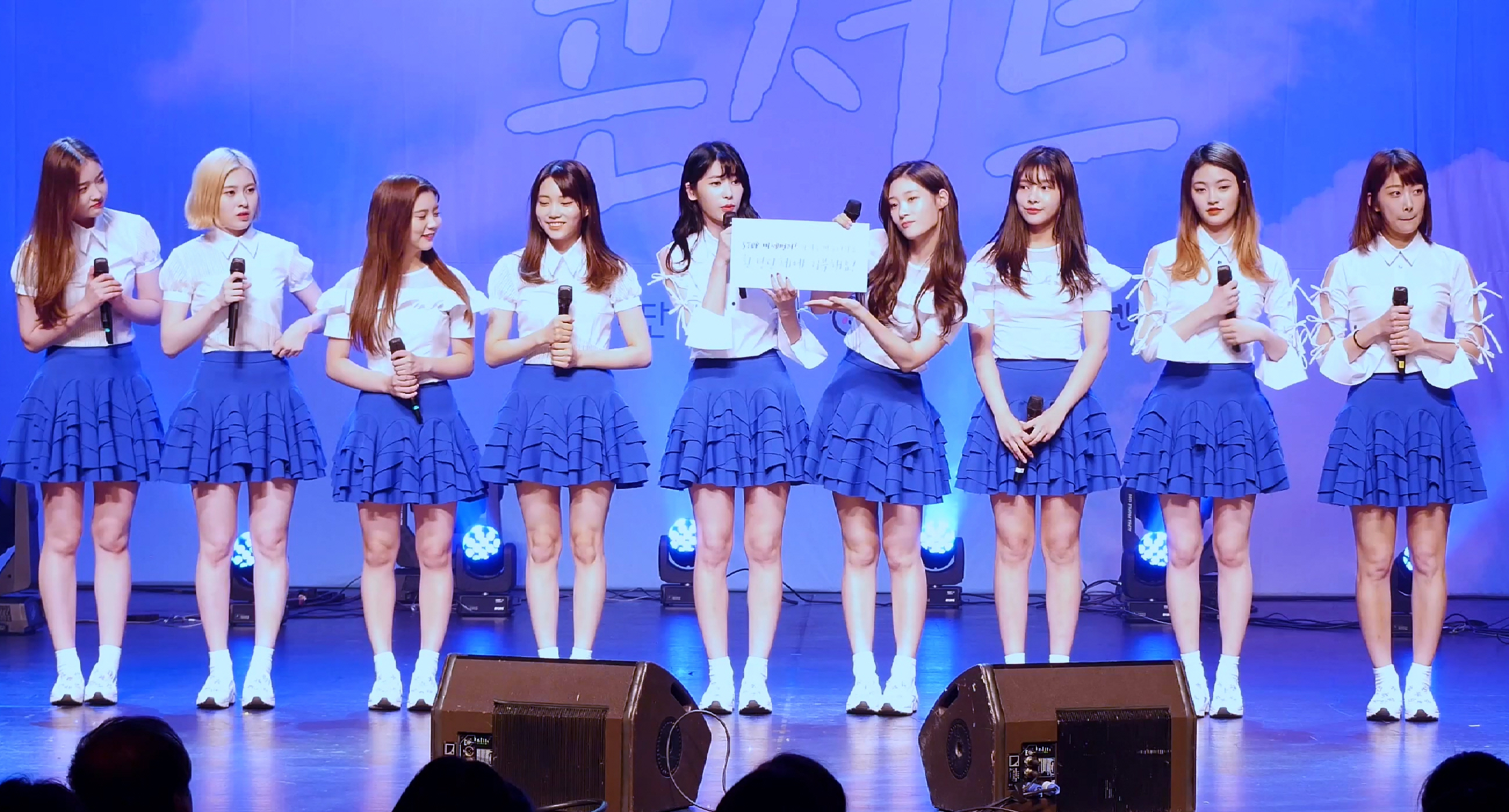 170616 환경의 날 6월의 기적 콘서트 - 다이아 '왠지' 4K 직캠 by DaftTaengk 37s